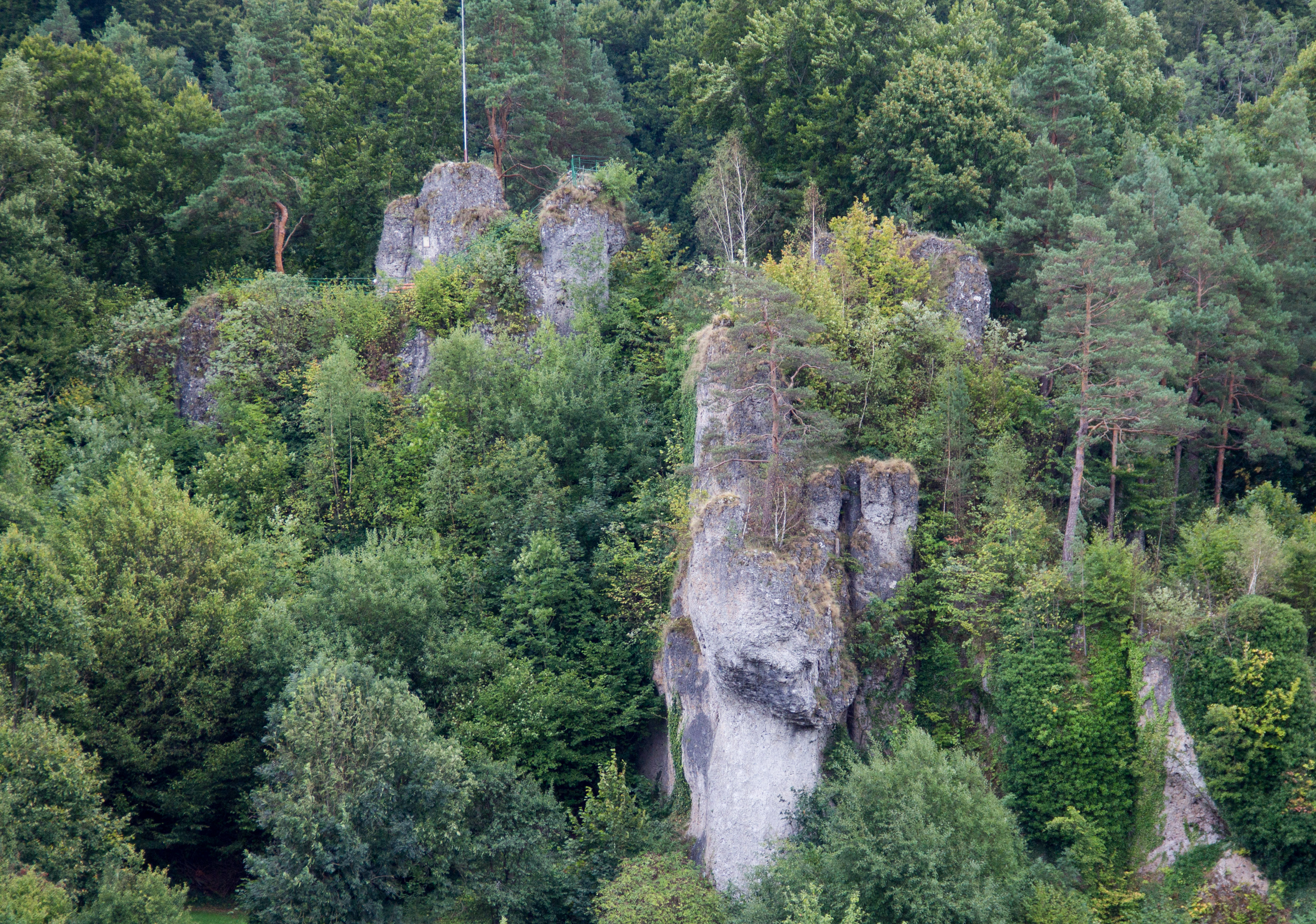 Gernerfels, Gößweinstein